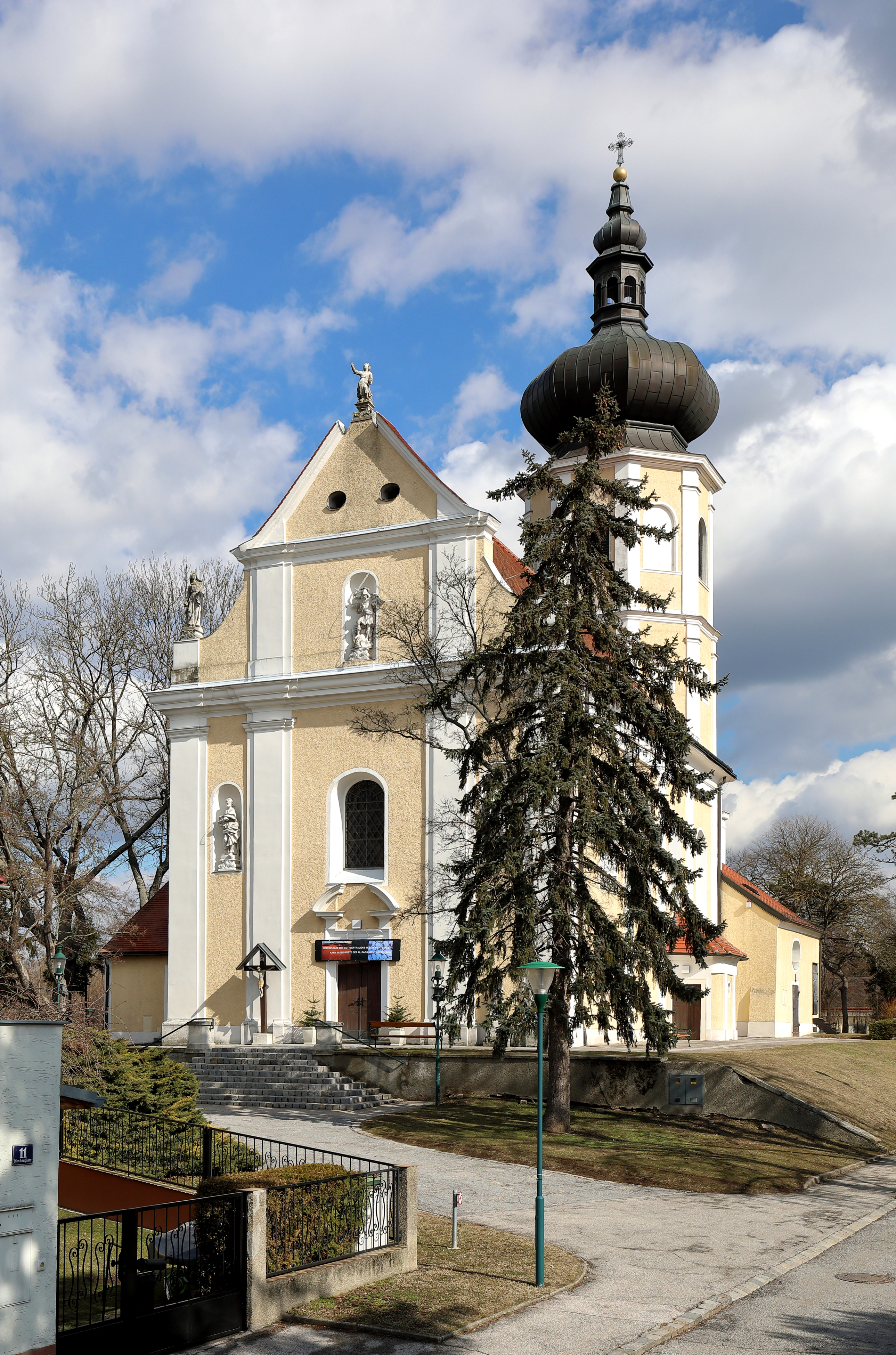 Südwestansicht der röm.-kath. Pfarrkirche hl. Michael in der niederösterreichischen Stadtgemeinde Fischamend.Das hohe, blockhafte Langhaus mit Lisenengliederung und Rundbogenfenstern wurde um 1700 errichtet. Der gotische Chor mit 5/8-Schluss stammt vermutlich aus der 1. Hälfte des 14. Jahrhunderts. Darauf wurde Ende des 17. Jahrhunderts ein oktogonaler Turm mit massiger Zwiebelhaube errichtet. Nordseitig des Chores ist eine Kapelle angebaut und südseitig die Sakristei.